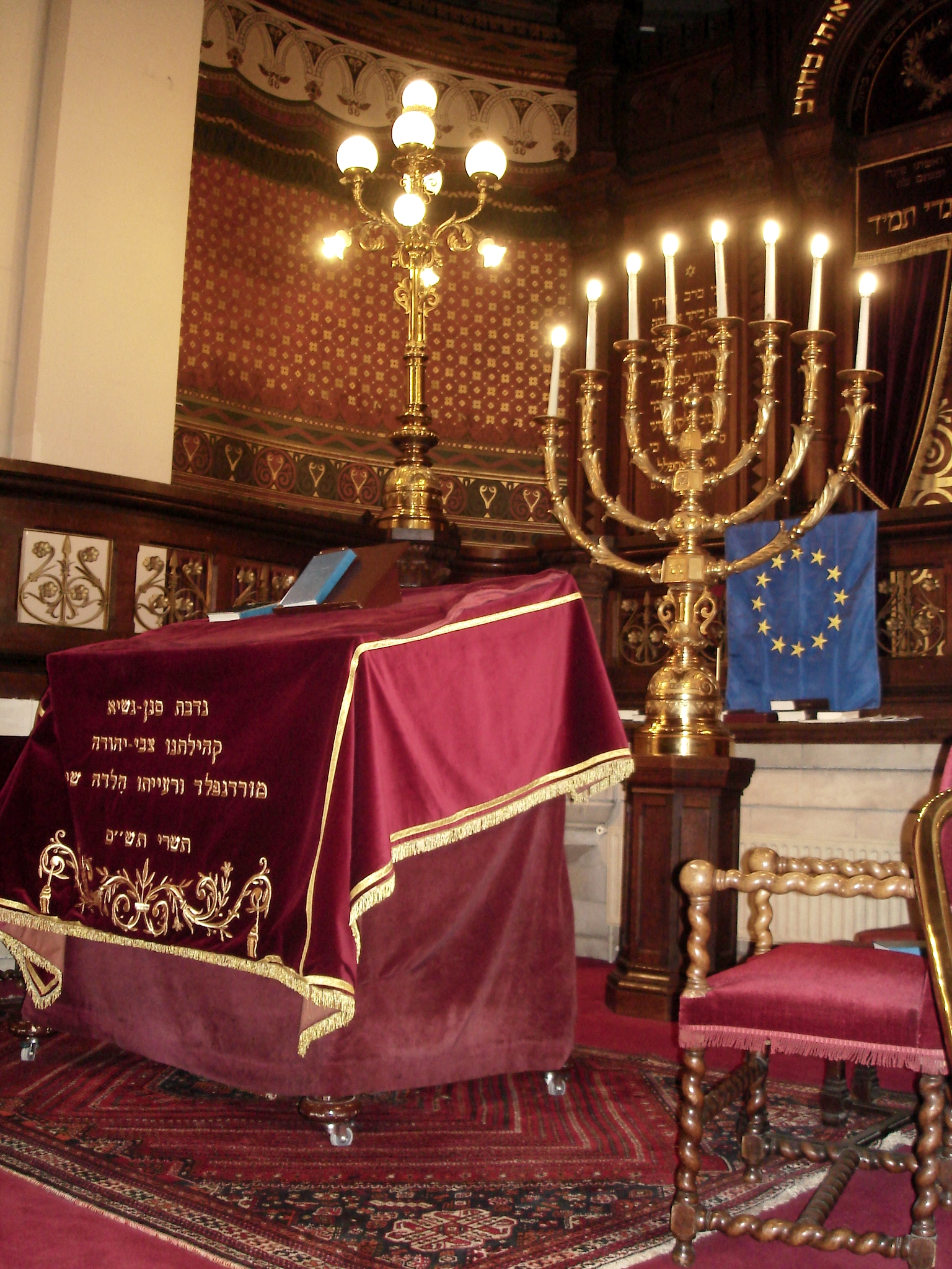 Grande synagogue de Bruxelles - La Bimah et le chandelier à 8 branches